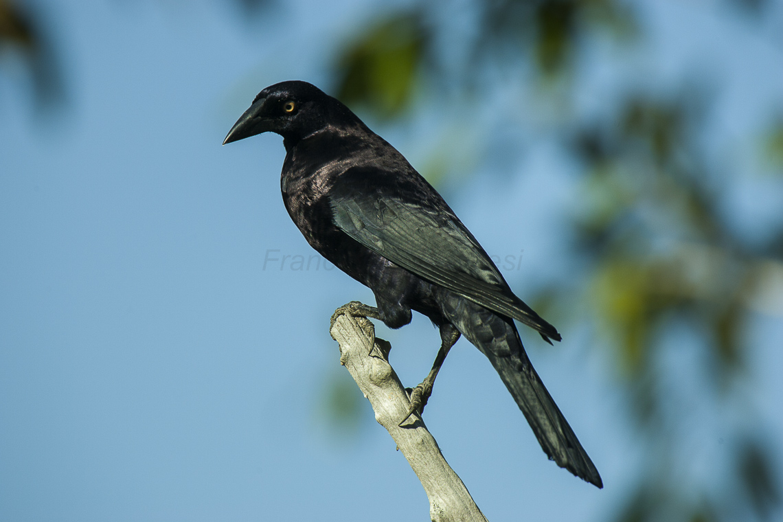 Giant Cowbird - Pantanal - Brazil_H8O0545